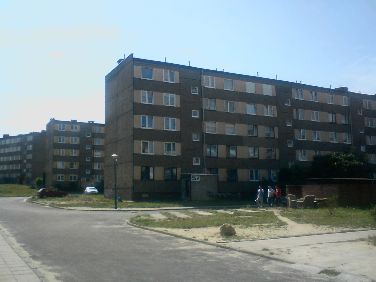 Osiedle Na Zatorzu (Szarych Szeregów Str.), Zatorze, Żary